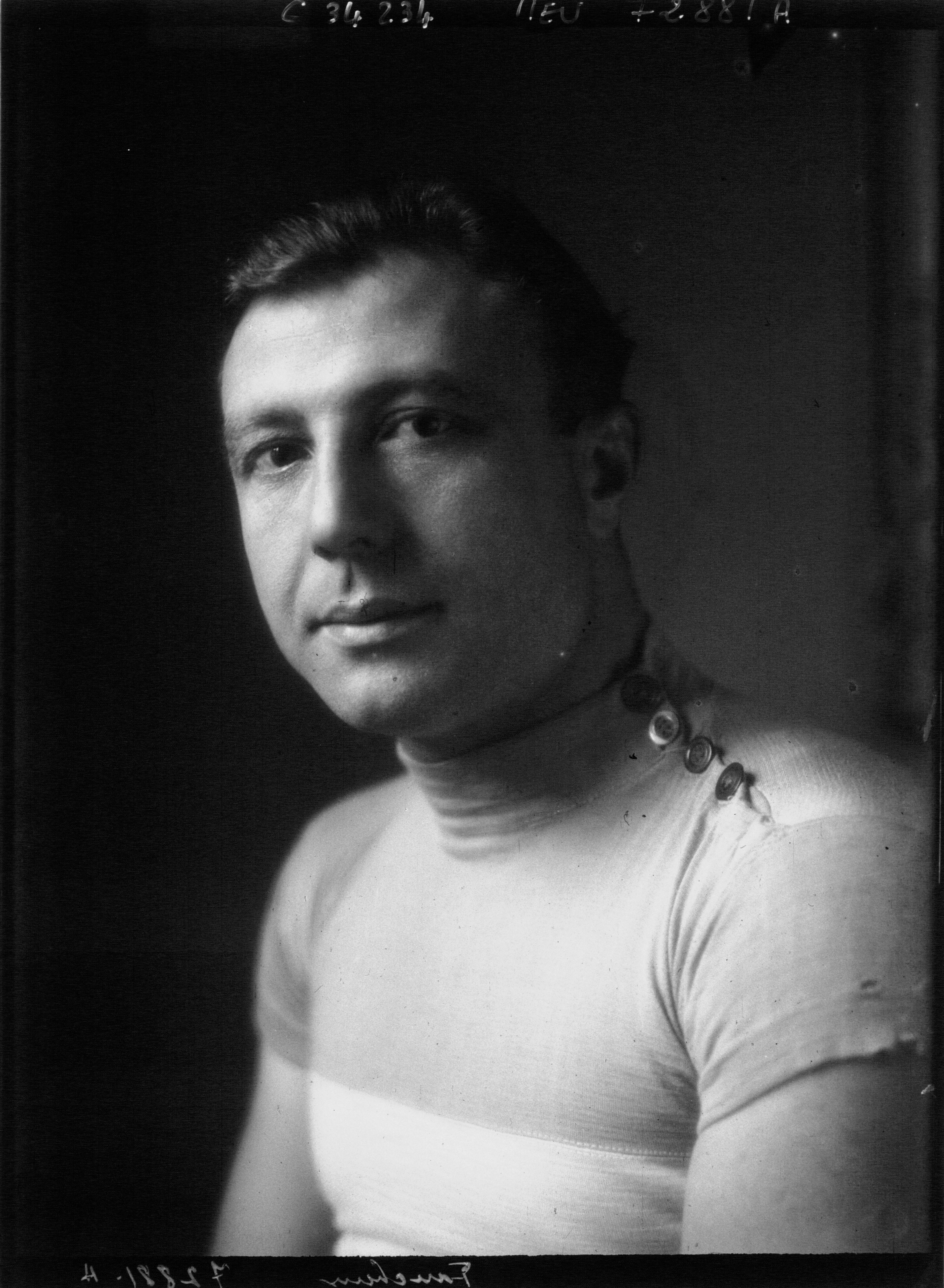 Faucheux, cycliste (portrait)